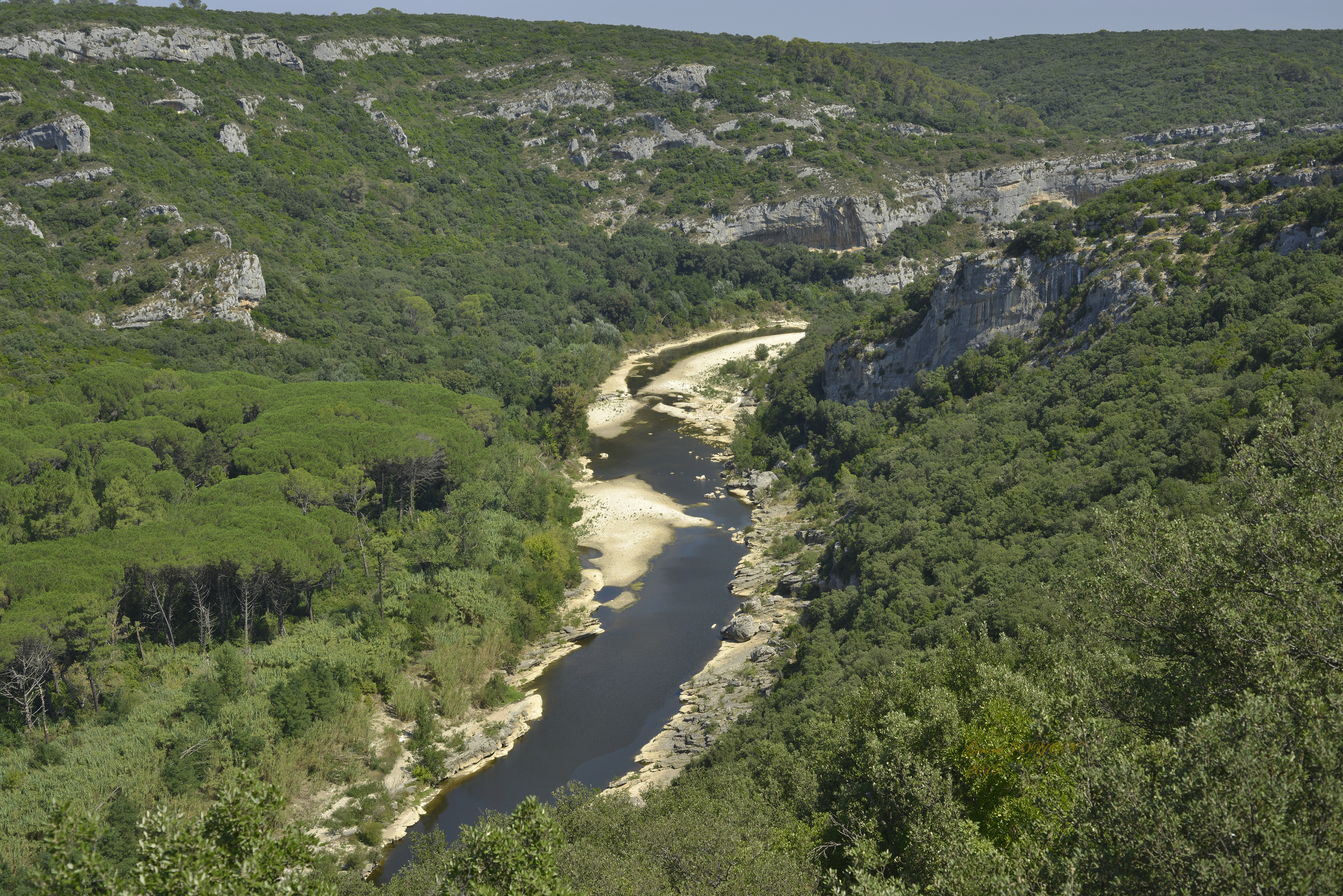 Nous sommes sur le camp des garrigues, sur la limite qui sépare POULX et SANILHAC .C'est à cet endroit que le pilote Charles BAILS, en 1944 est tombé avec son chasseur bombardier. En bas coule la rivière le GARDON. Il est 10h24 en heure solaire.Le soleil est en Sud Sud /Est.